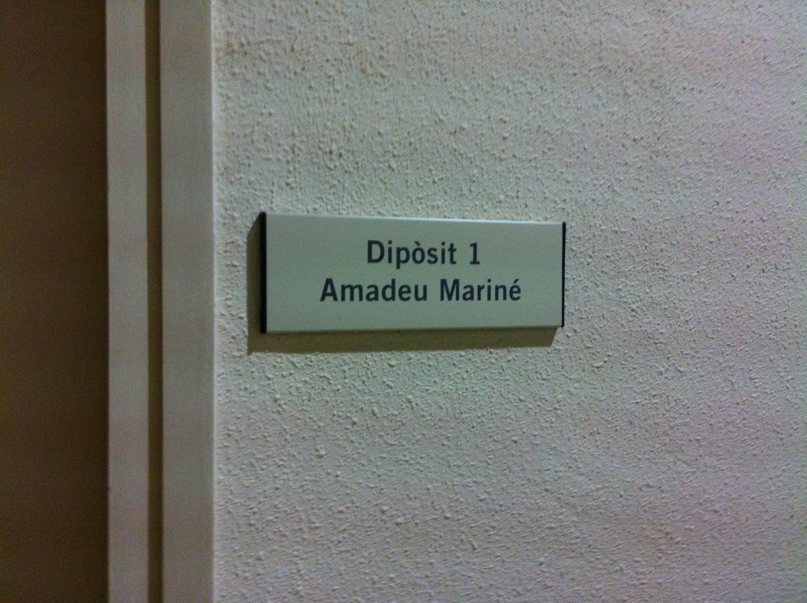 Magatzems de l'Arxiu Fotogràfic de Barcelona